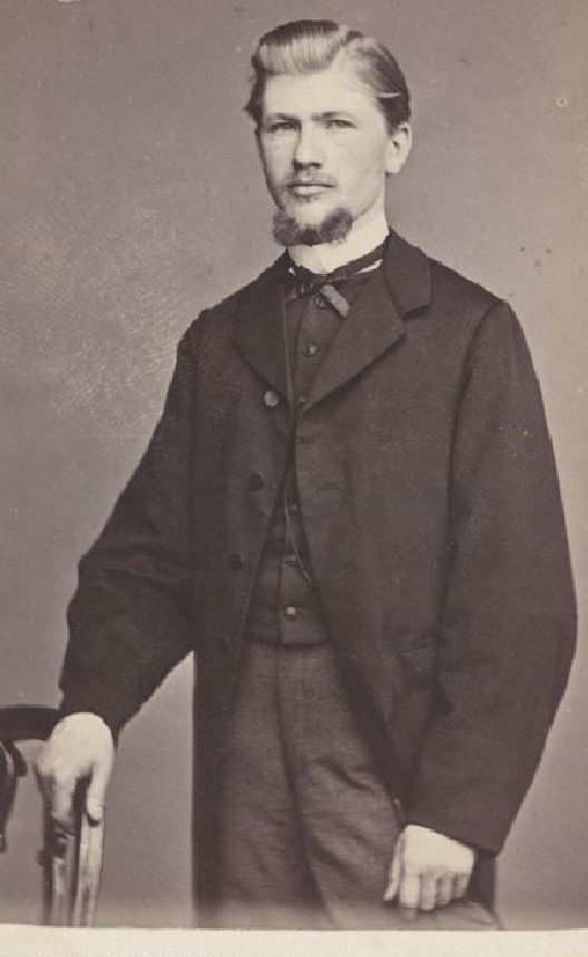 Carl Glaser (* 27. Juni 1841 in Kirchheimbolanden; † 25. Juli 1935 in Heidelberg) bei A. Kekule in Gent (Belgien)